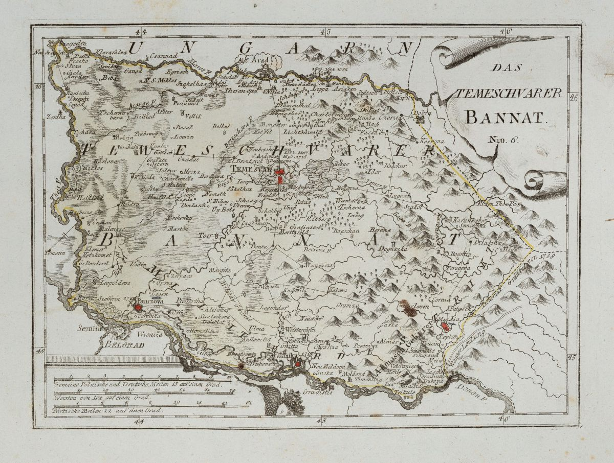 Das Temeschvarer Bannat. Nro. 6. Kolorierter Kupferstich